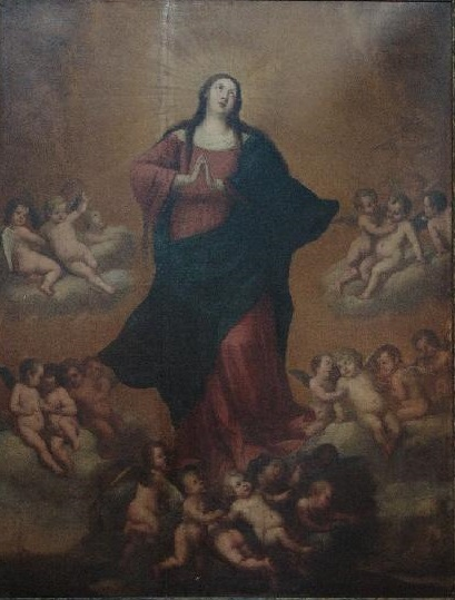 La obra representa la Inmaculada Concepción de la Virgen María, madre de Jesucristo.